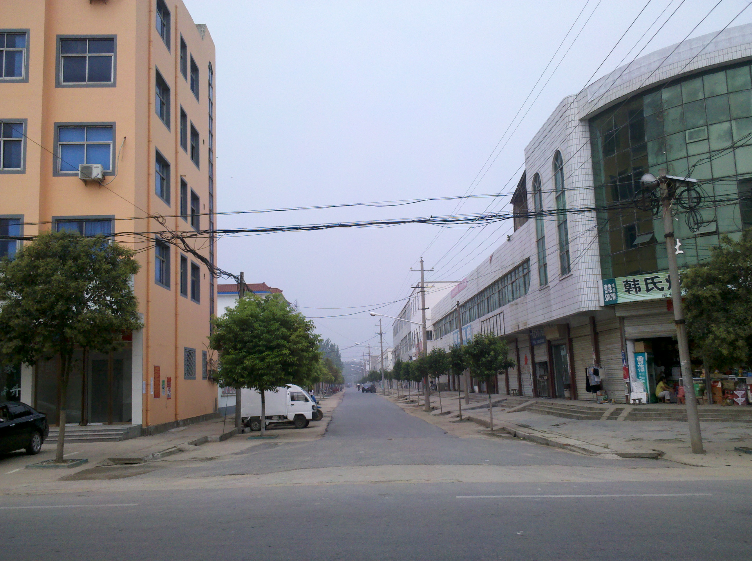 固始县李店乡集镇街景